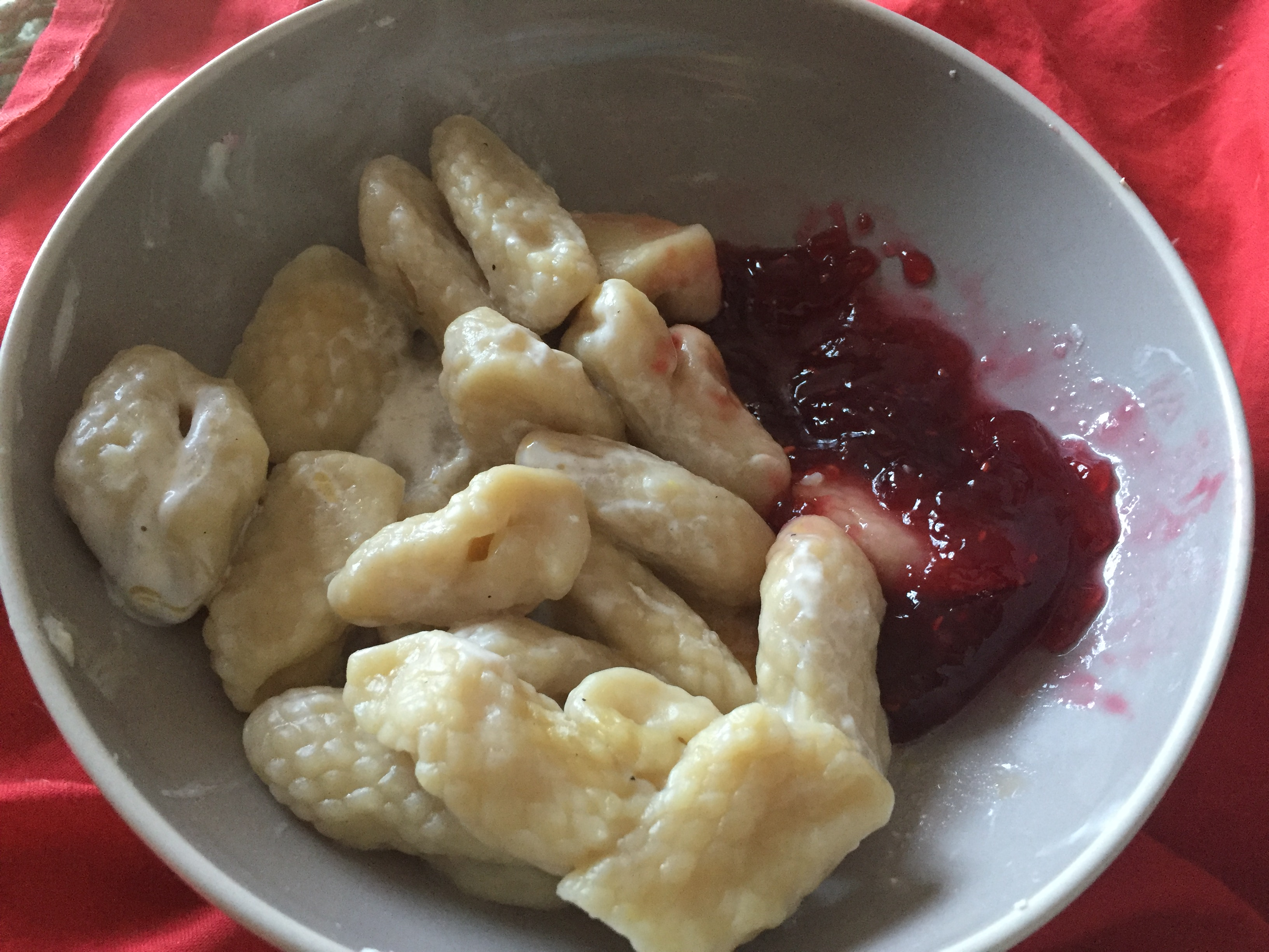 Varškiniai ežiukai su uogiene